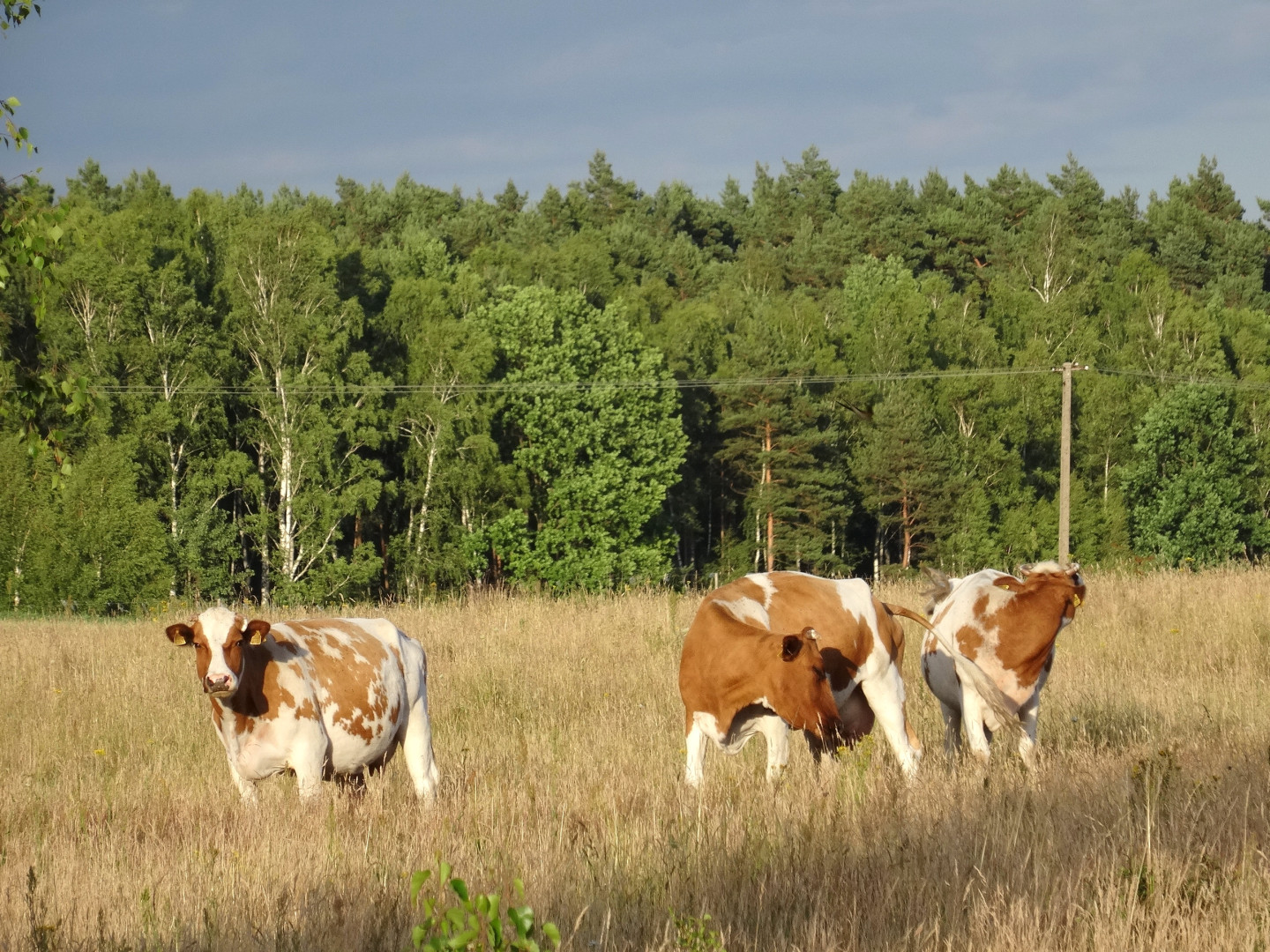 Położona w Puszczy Bydgoskiej wieś Leszyce, gmina Nowa Wieś Wielka, powiat bydgoski